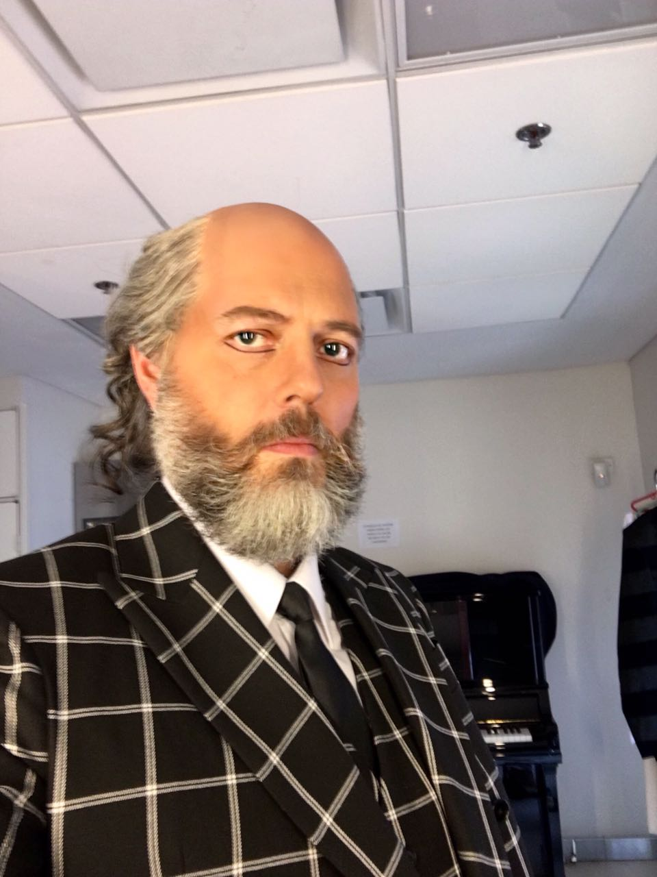 Leonardo Estévez interpretando el papel del conde Francesco Cenci (ópera de Alberto Ginastera Beatrix Cenci) - Foto tomada en el camarín del Teatro Colon